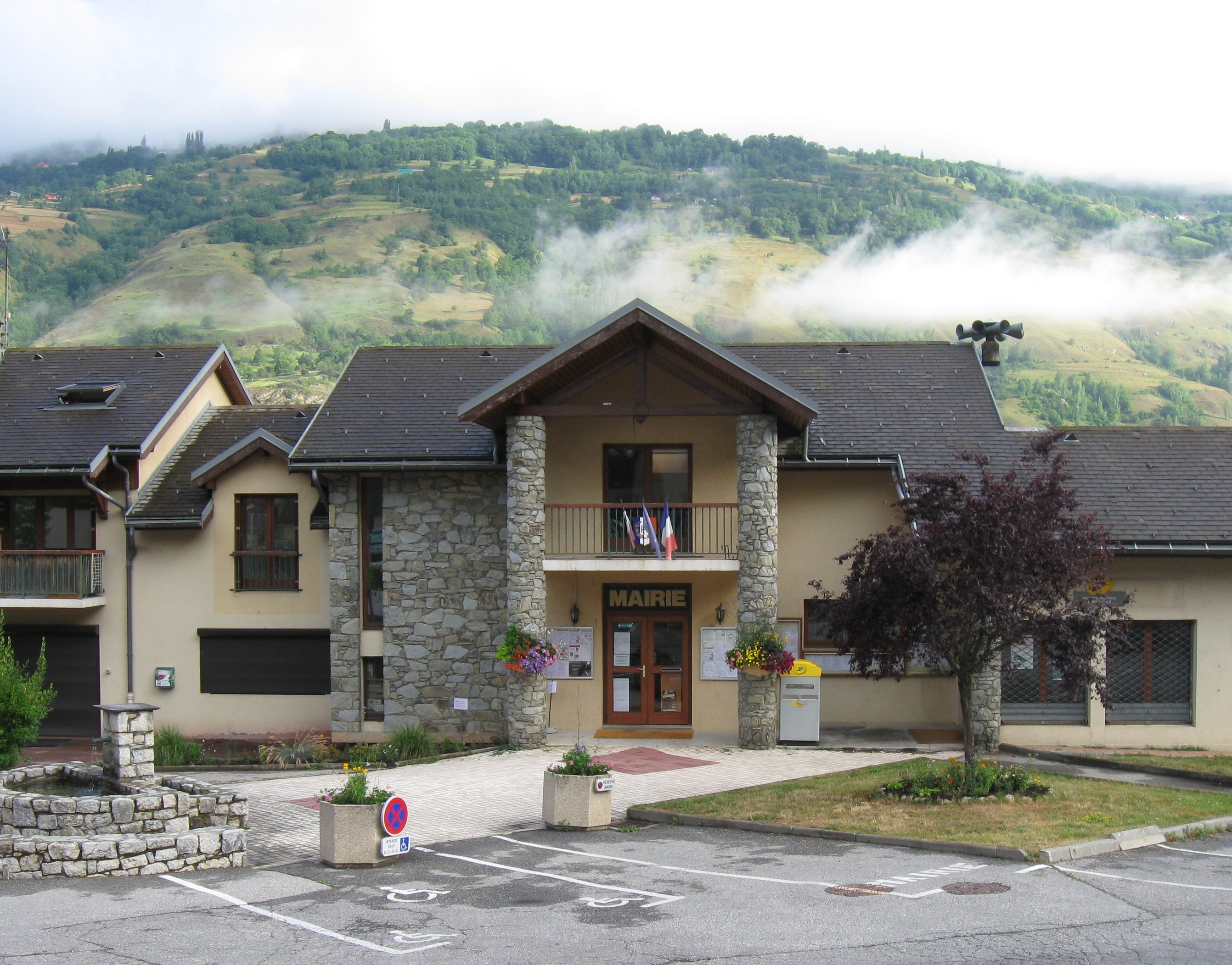 Mairie de Landry. (Savoie, Auvergne-Rhône-Alpes).